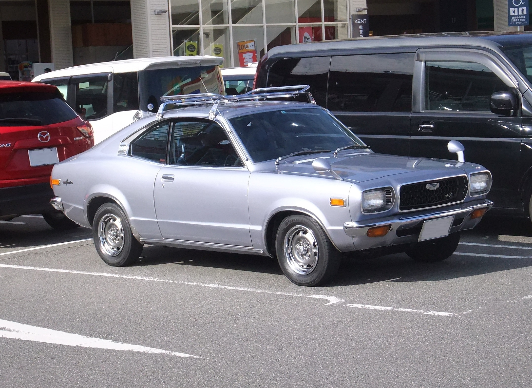 マツダ・グランドファミリア